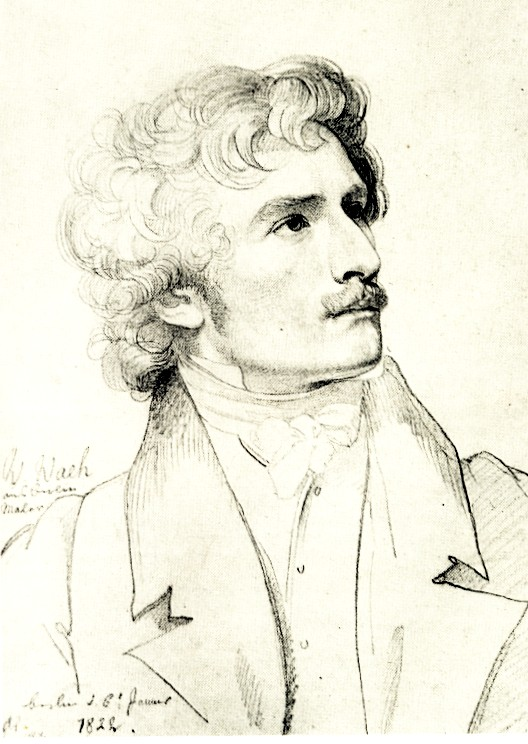 Porträt des Malers Karl Wilhelm Wach